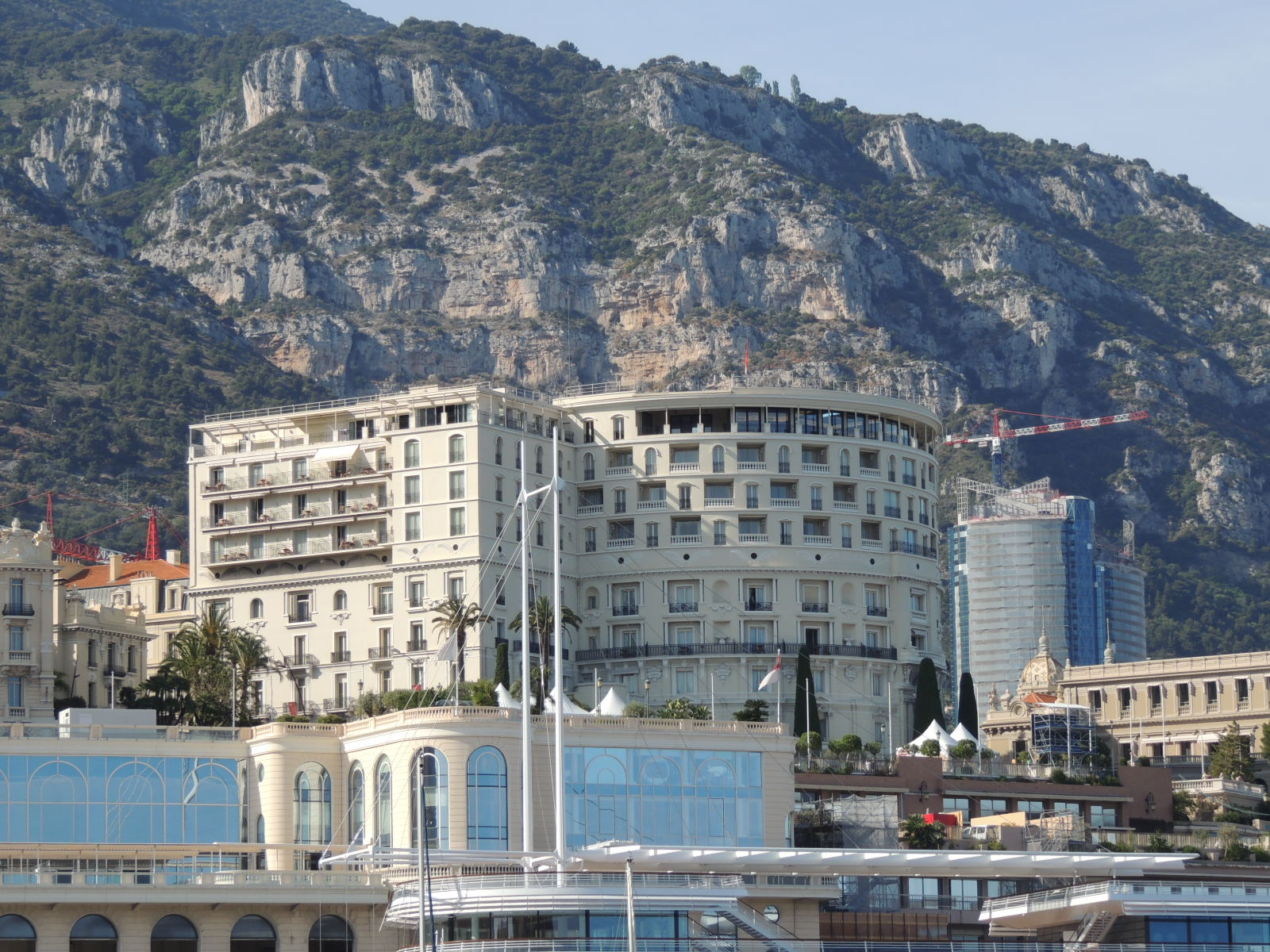 H. de paris, Monaco